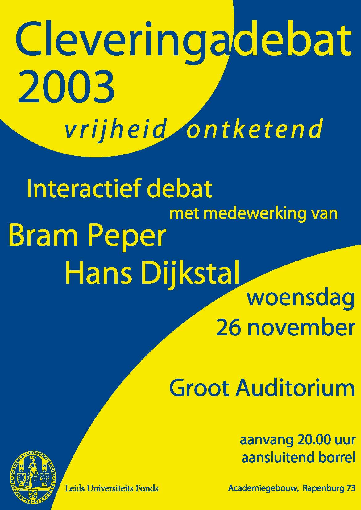 Aankondigingsposter Cleveringadebat 2003